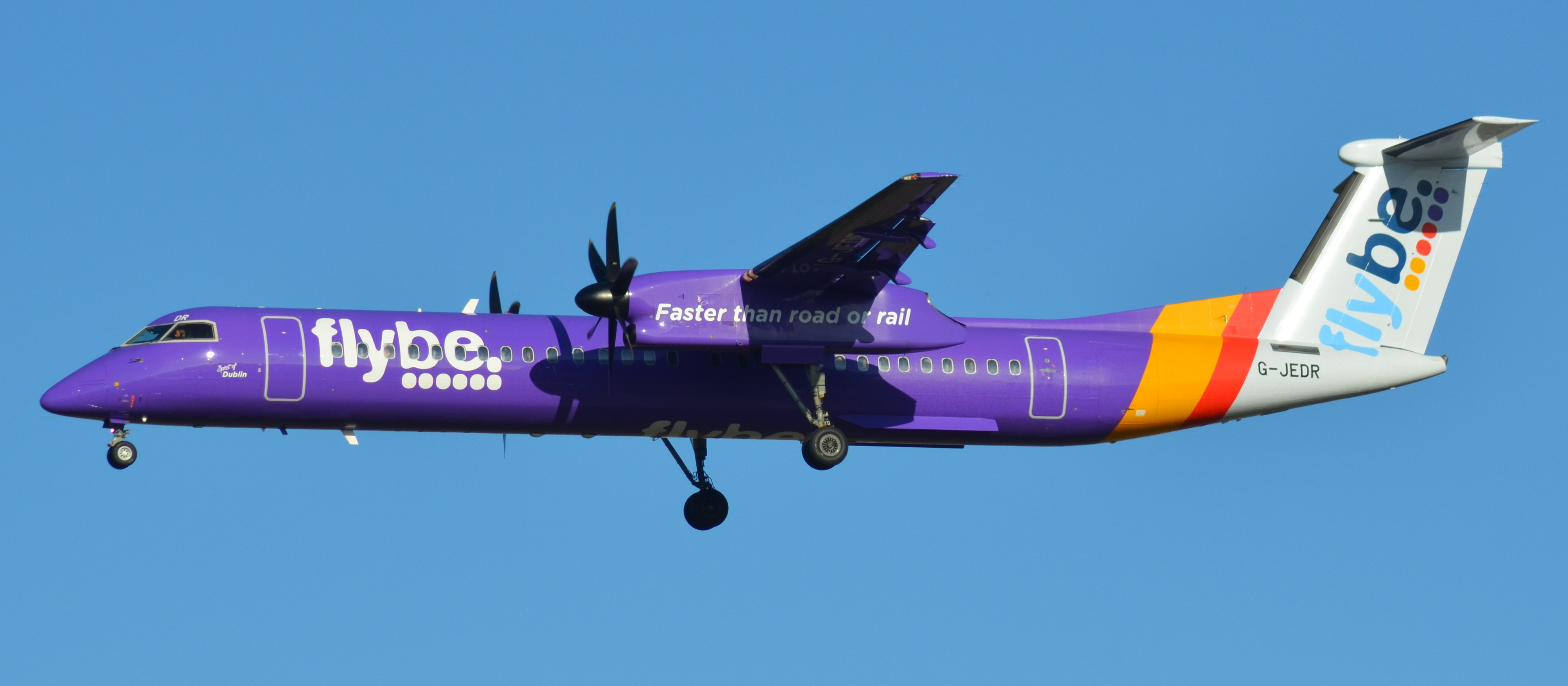 DASH.8-400 G-JEDR 4087 FLYBE PURPLE 09 02 15 TLS